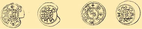 Béla I. - knížecí denáry